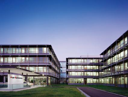 Orga Systems, Paderborn